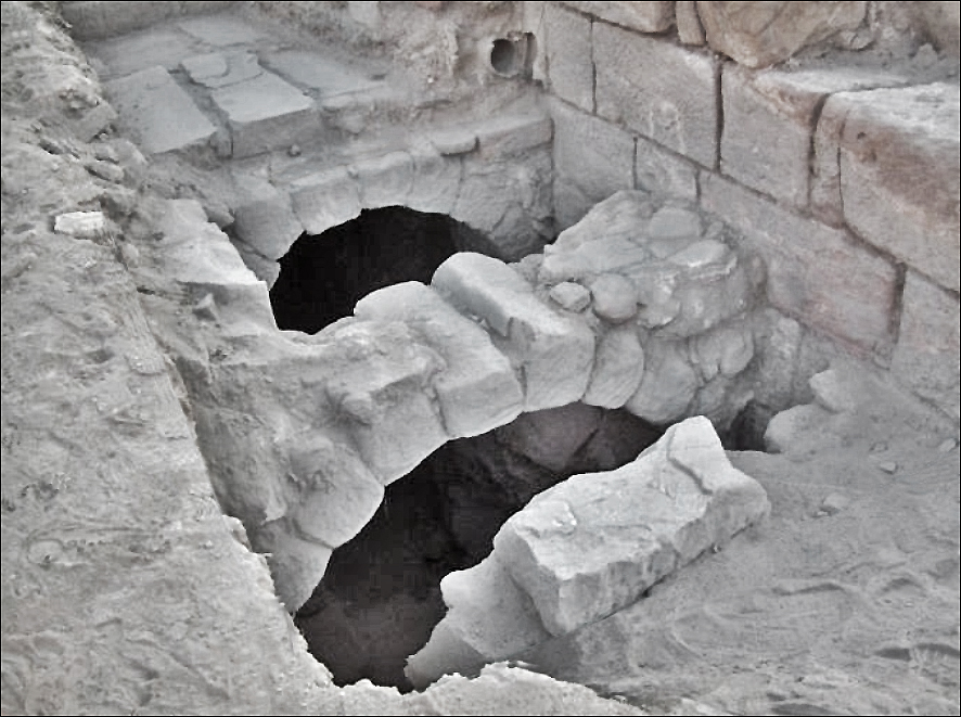 Principe d’une citerne enterrée et voûtée sur un des site de fouilles des thermes du Centre à Pétra.